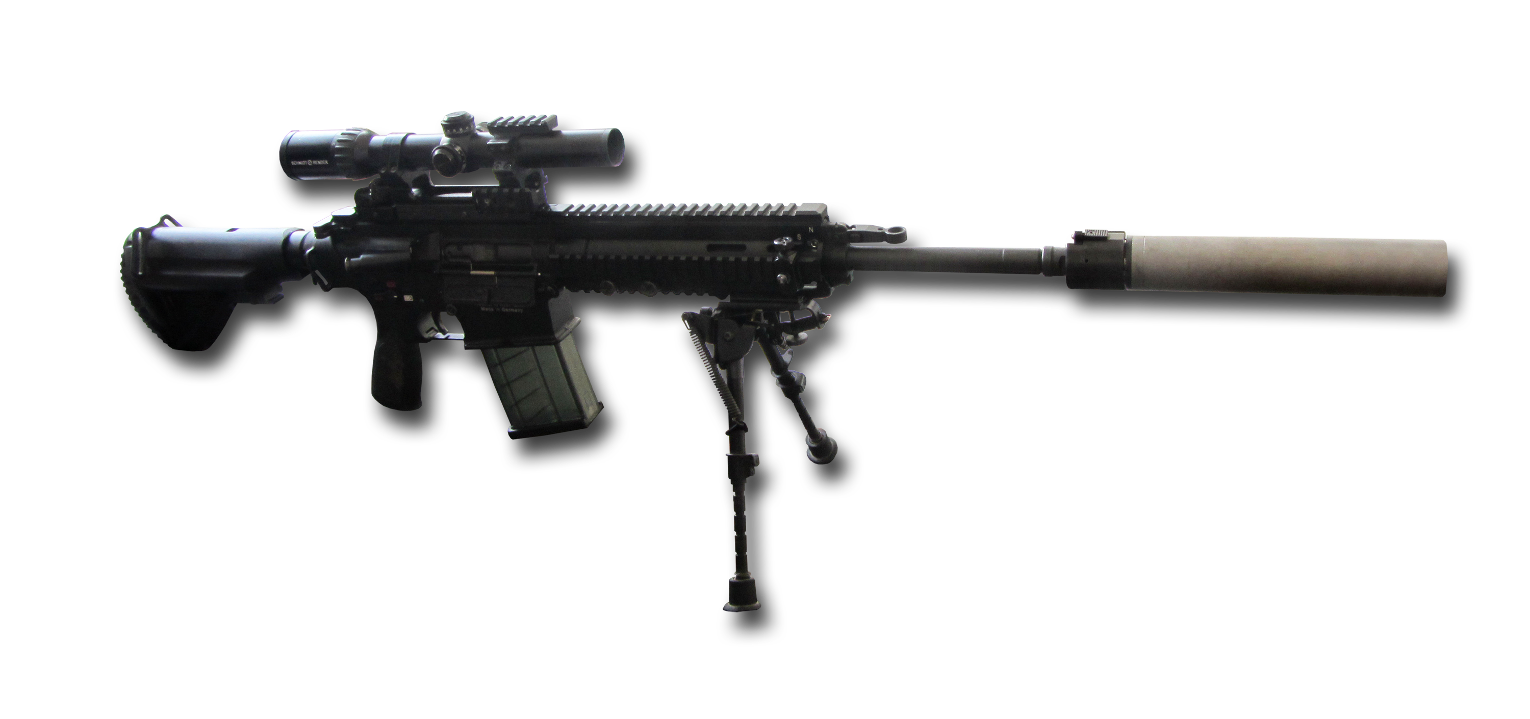 G27 Scharfschützengewehr der Bundeswehr